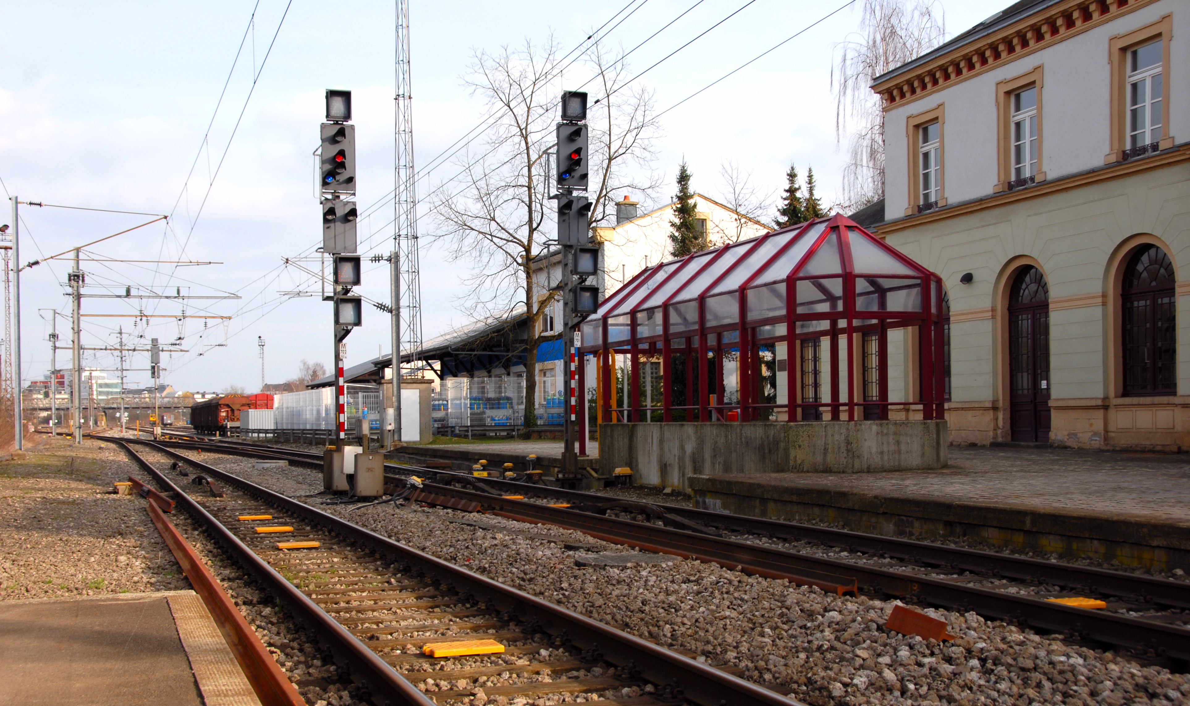 Sujet: D'Gare zu Lëtzebuerg-Hollerech. Hollerech